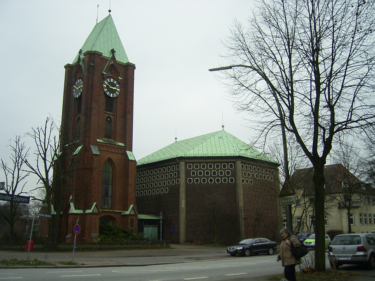 Vom ursprünglichen neugotischen Bau der evangelisch-lutherischen St.-Thomas-Kirche an der Lindleystraße in Rothenburgsort, der 1883 bis 1885 nach Plänen von C.H. Grassmann errichtet wurde, blieb nach den Bombenangriffen von 1943 nur der Turm stehen. 1956/57 wurde nach Plänen von Otto Kindt ein achteckiges Kirchenschiff aus Stahlbeton neu errichtet.